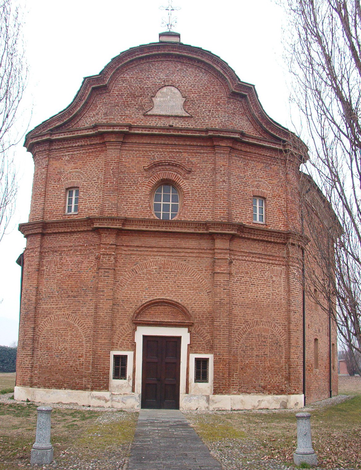 Cappella Pilotto - Volvera - Provincia di Torino - Italia